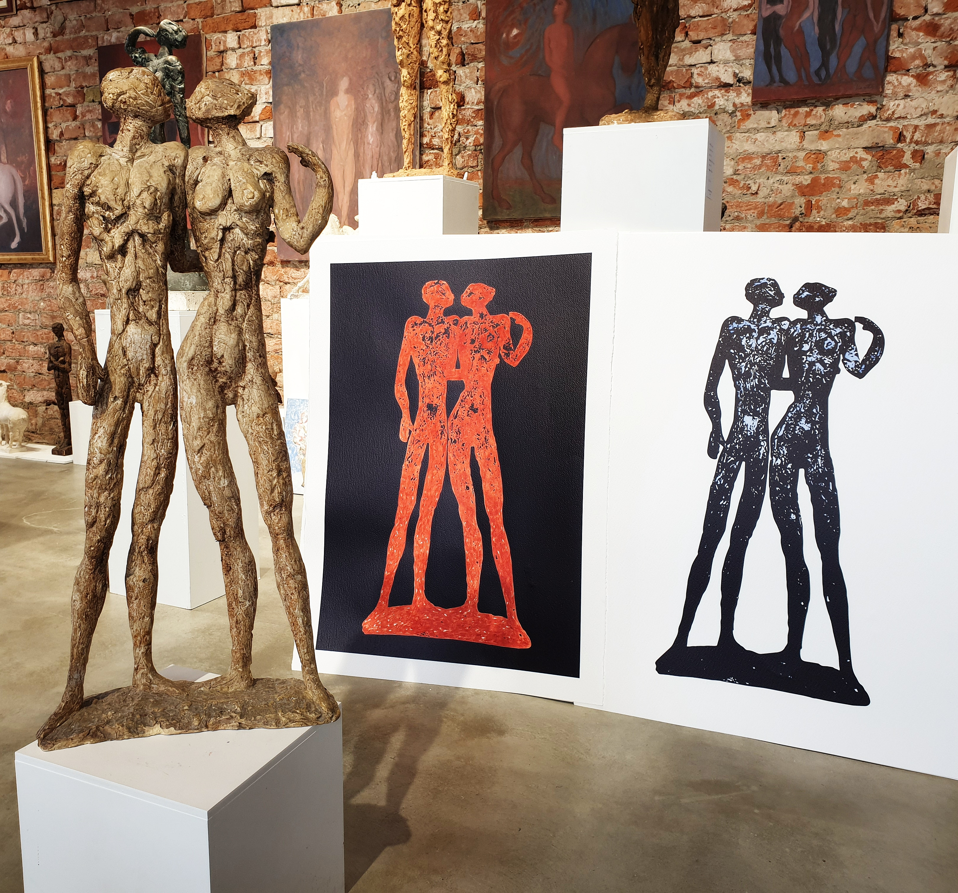 Kiparske siluete, kombinirana tehnika, godina 2019